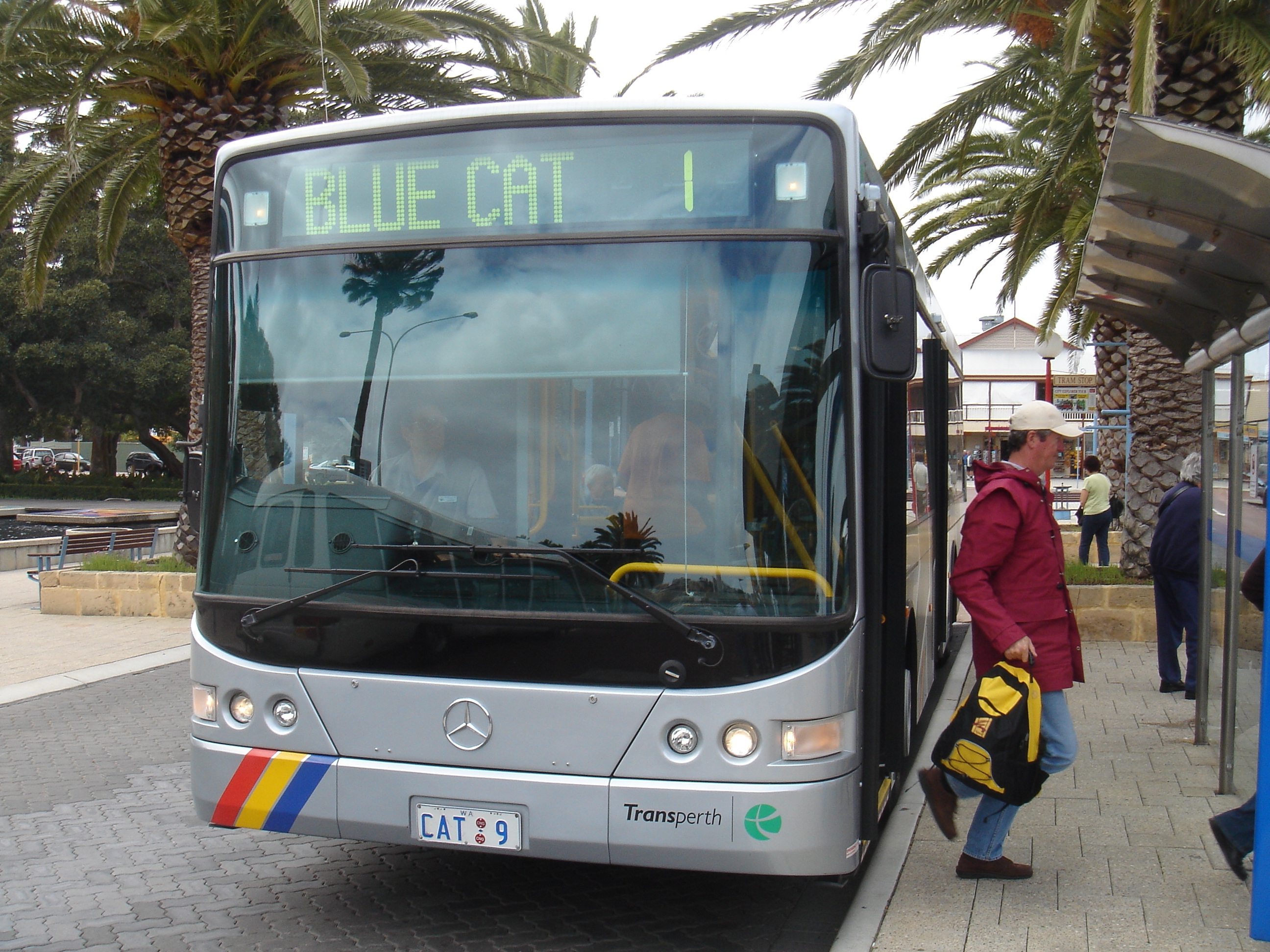 Transperth Blue CAT 9, Mercedes-Benz O 500LE (Volgren CR228L) bus.